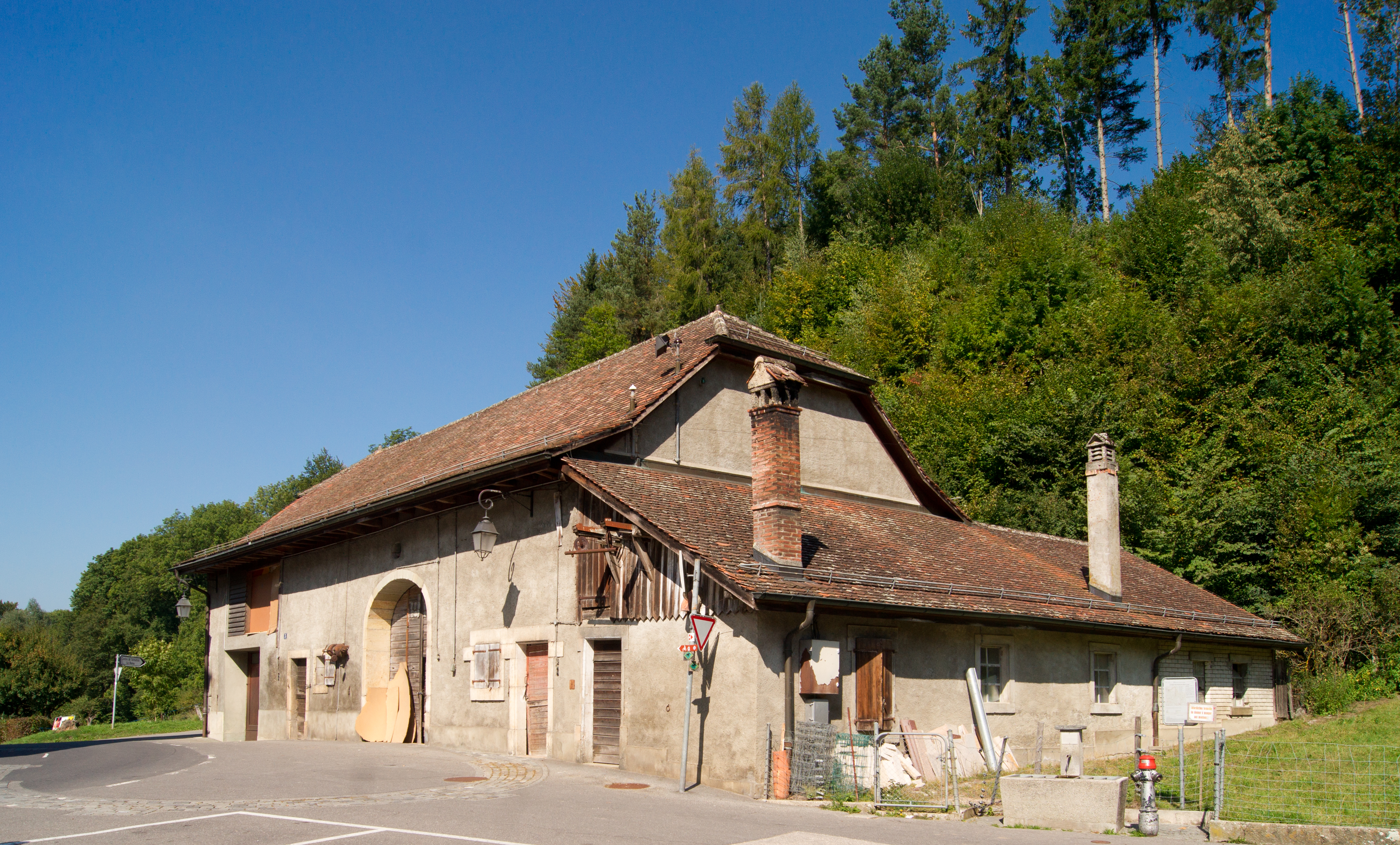 Bâtiment à Montheron, Lausanne, Suisse.